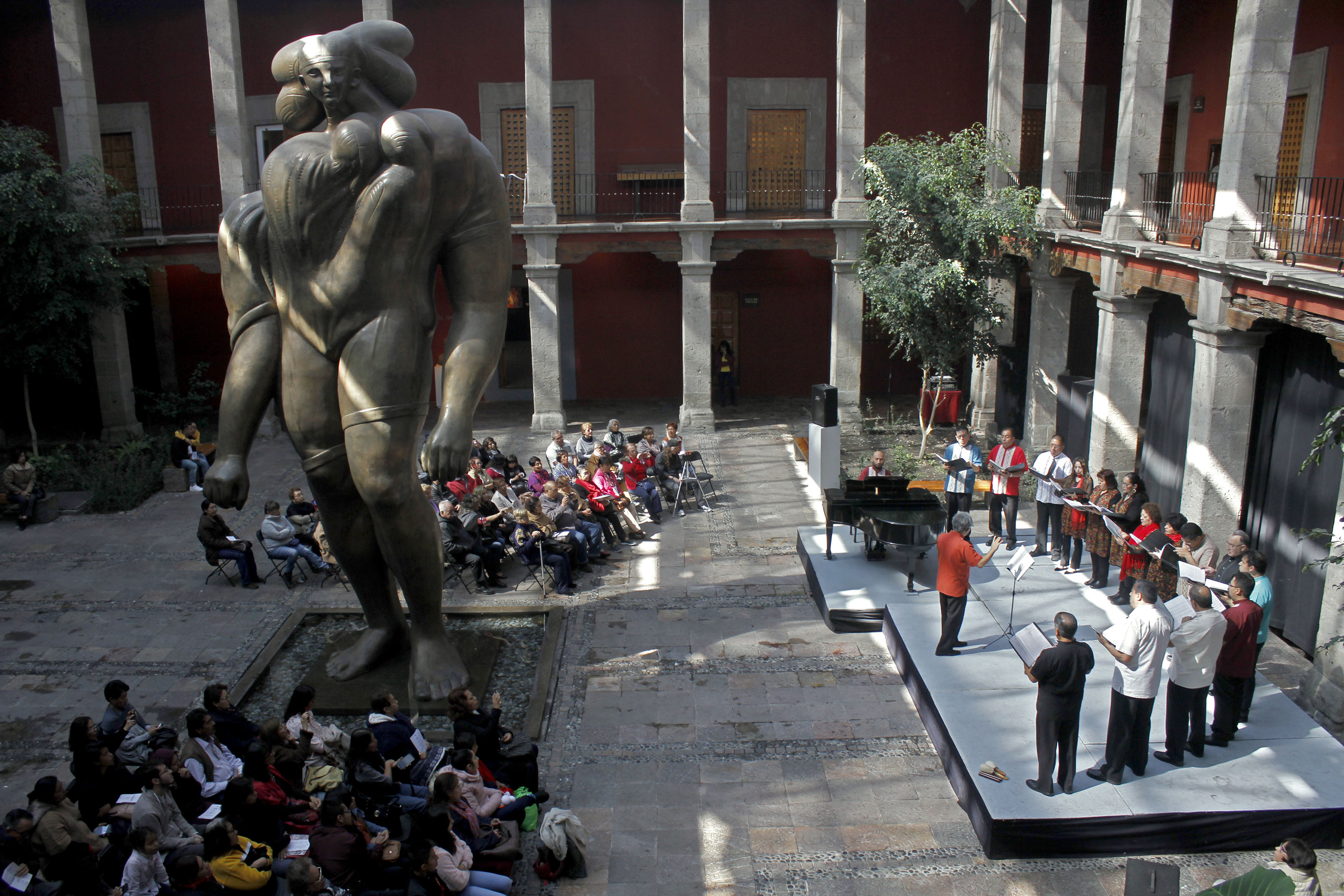 Domingo 16 de diciembre de 2018 En el Museo José Luis Cuevas, el Coro de la Ciudad de México ofreció en un recital formado por composiciones de autores nacionales, así como temas navideños de la tradición popular mexicana como Noche de paz, Carillón, Mi ciudad y La bamba. Fotografía: Maritza Ríos / Secretaría de Cultura de la Ciudad de México